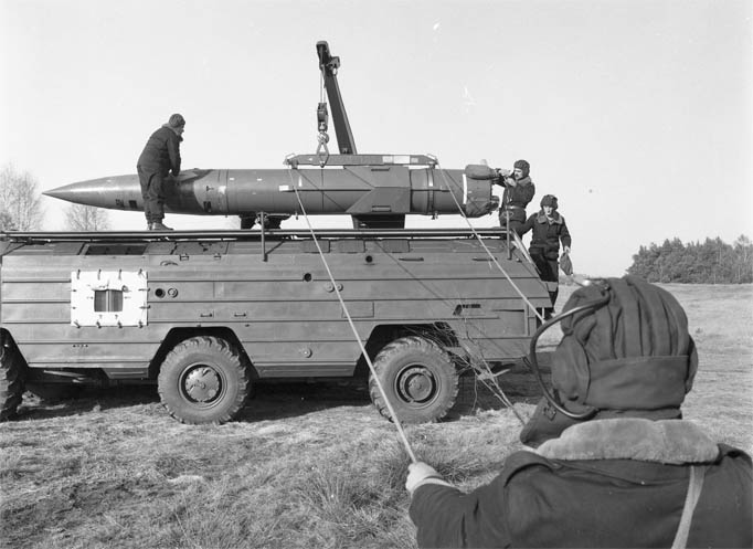 Pierwszy start Toczki w WP